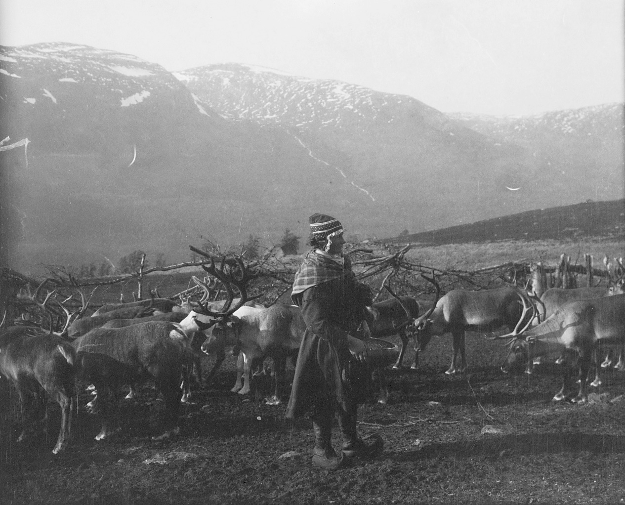 Ukjent fotograf. Fra arkivet etter Reinbeitekommisjonen (NBR0214_00107).